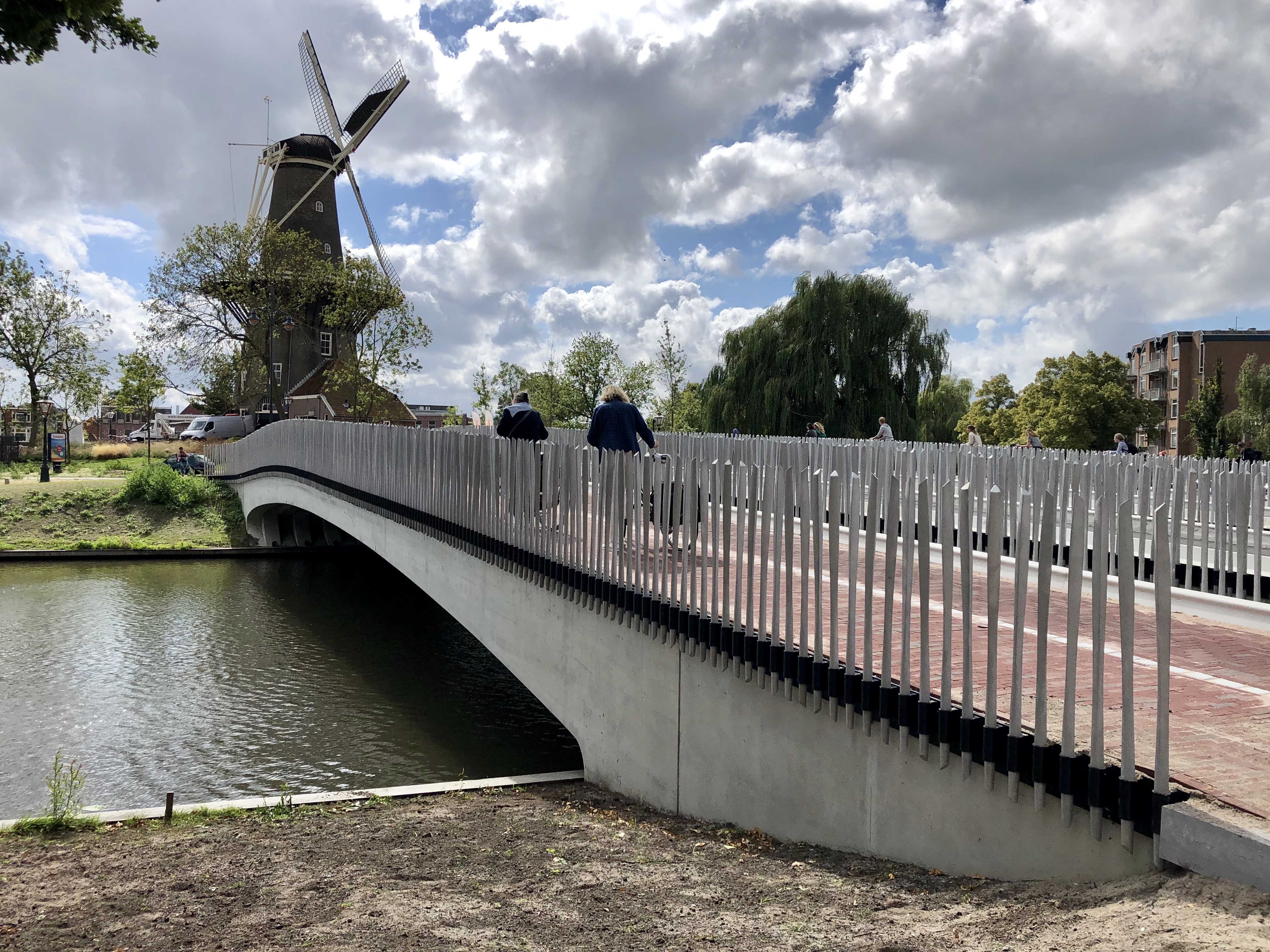 De nieuwe Valkbrug in september 2019.